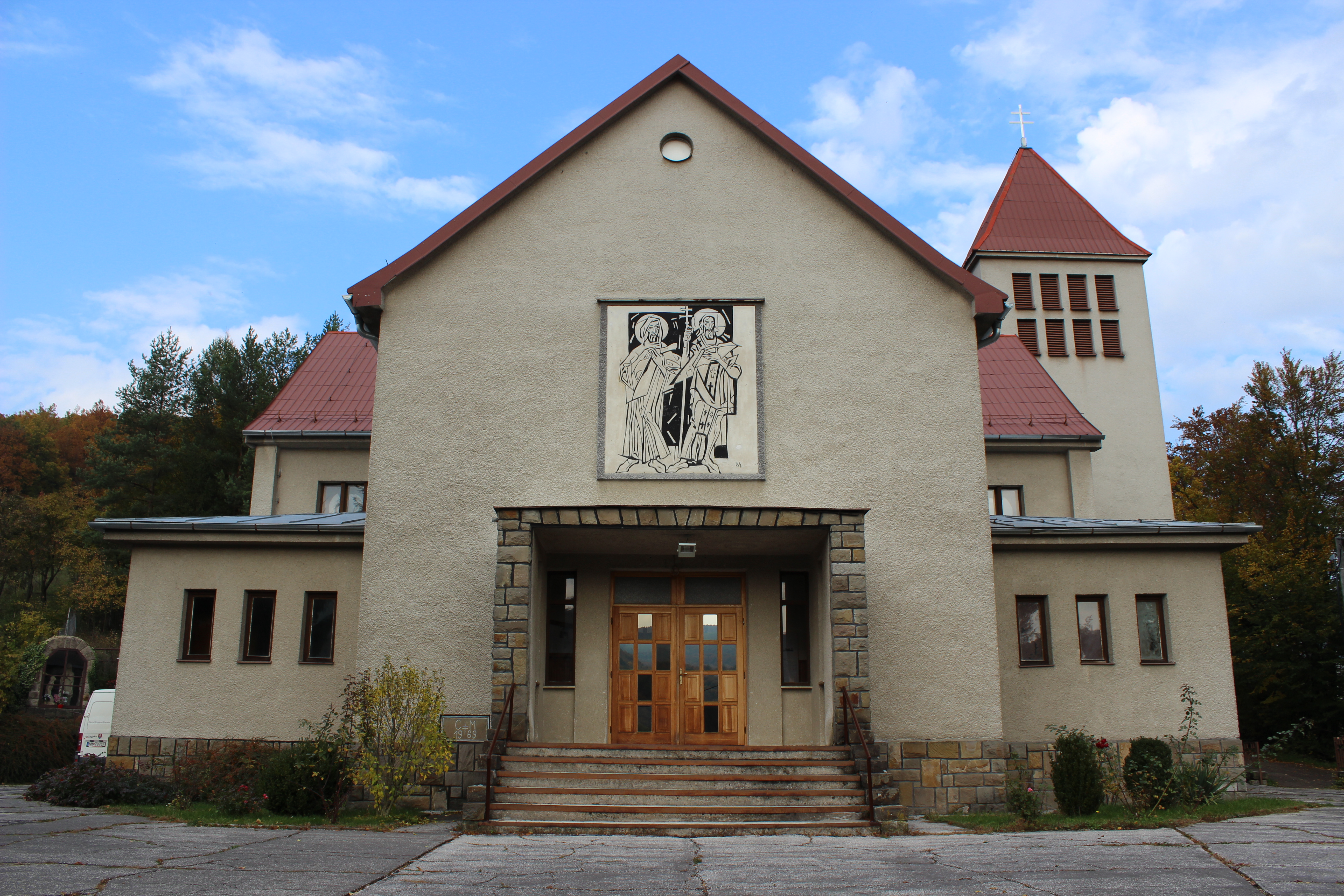 Kostel v Nové Bošáci (pohled od jihozápadu).